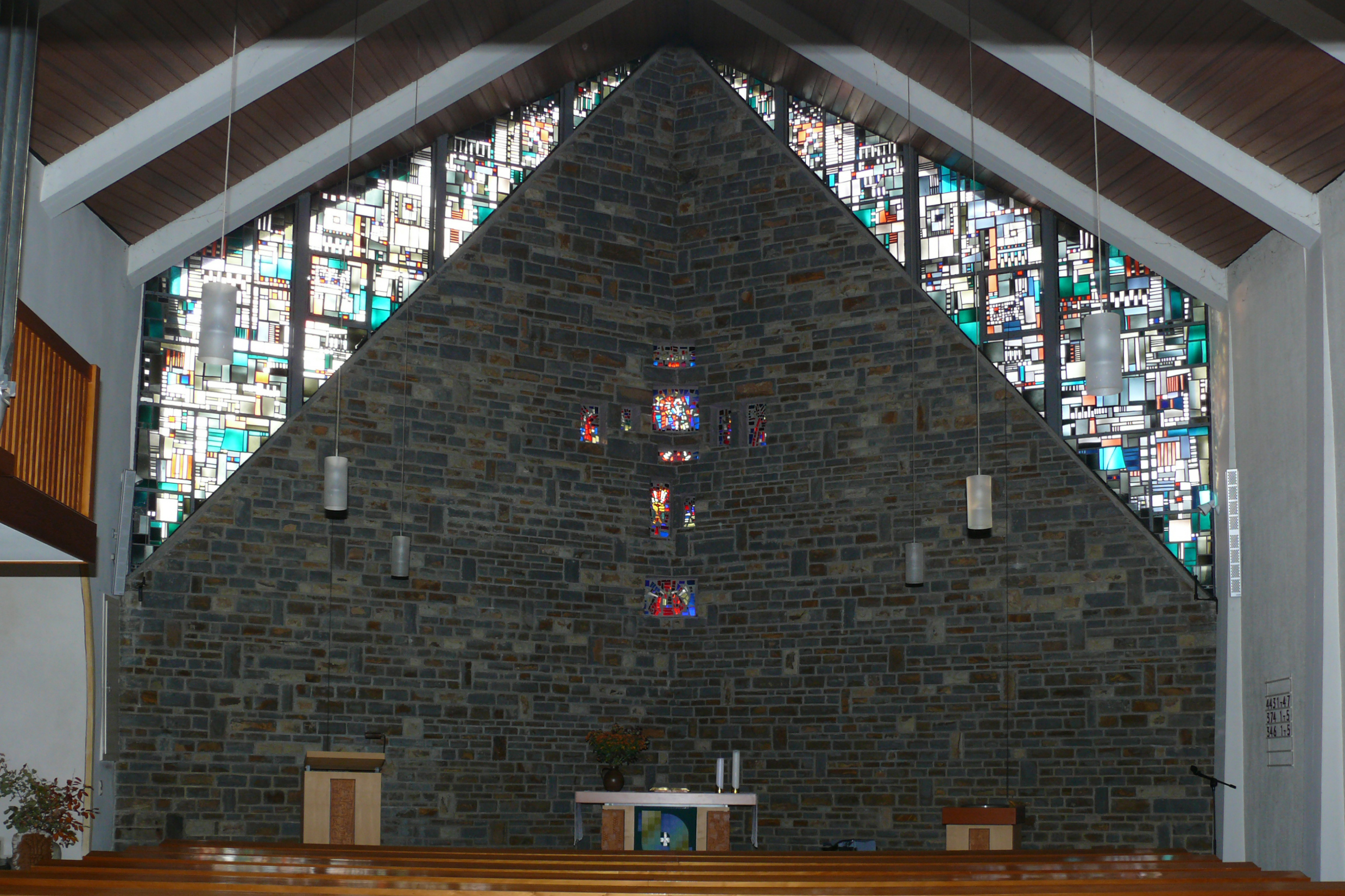 Ehringshausen-Katzenfurt, evangelische Kirche, Altarraum